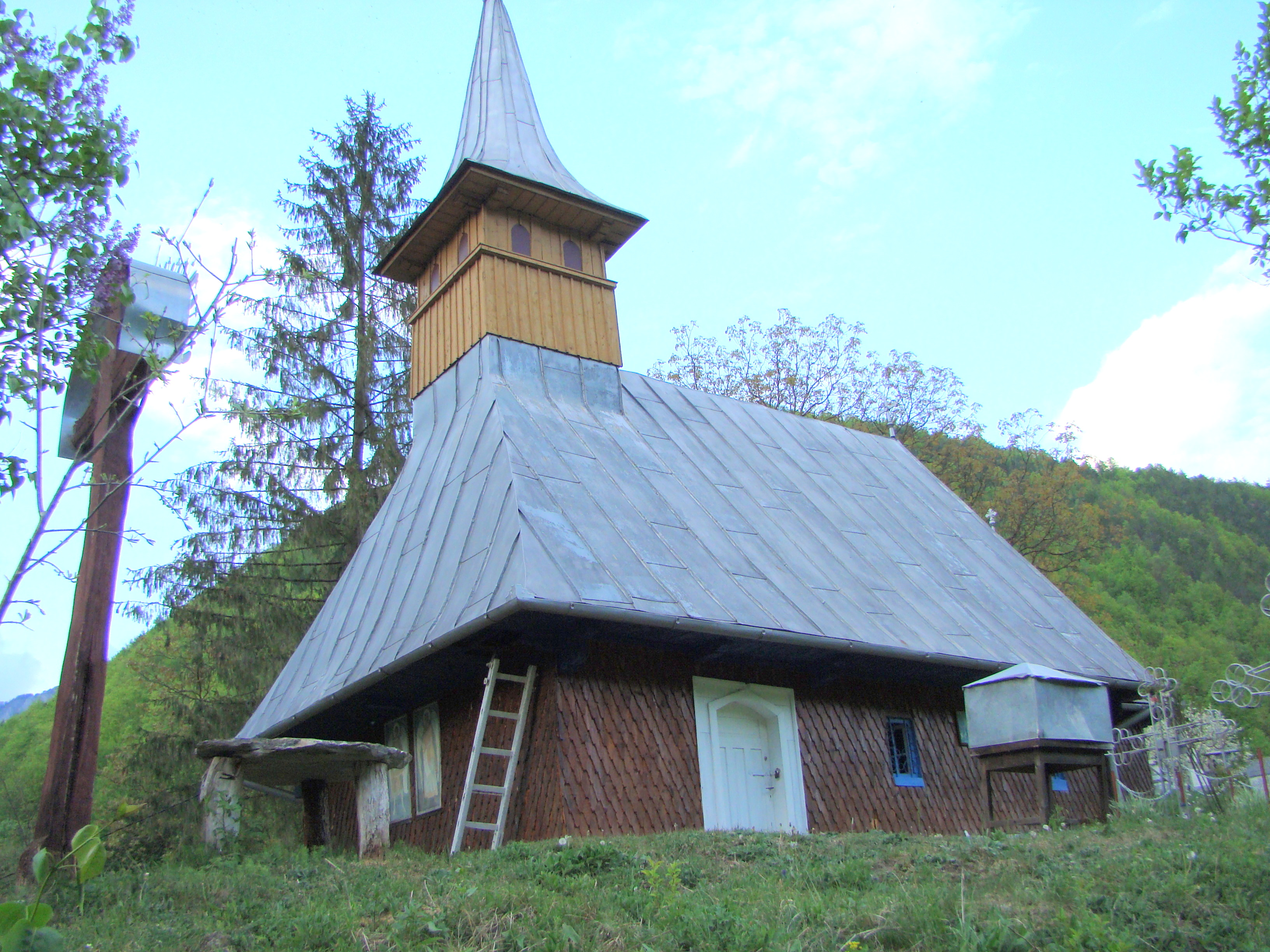 Biserica de lemn din Belioara(Poșaga de Sus)